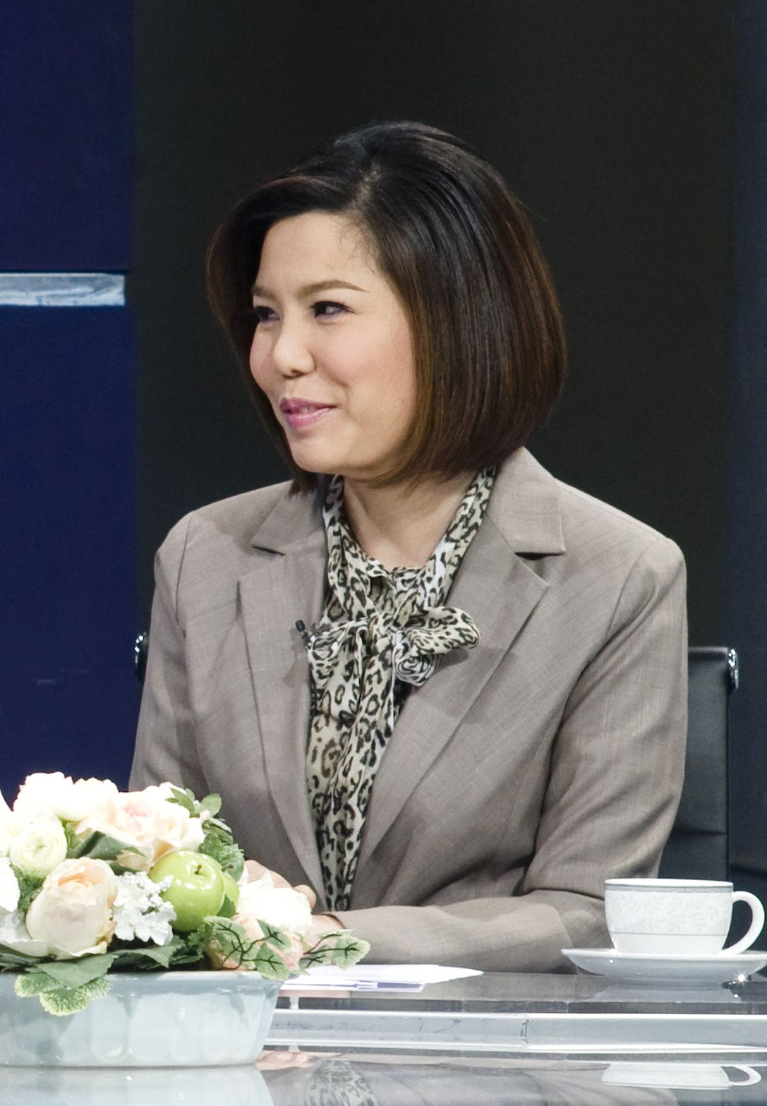 ตวงพร อัศววิไล / นายกรัฐมนตรี บันทึกรายการเชื่อมั่นประเทศไทยฯ ณ NBT 6 มีนาคม 2553 (The Official Site of The Prime Minister of Thailand Photo by พีรพัฒน์ วิมลรังครัตน์)